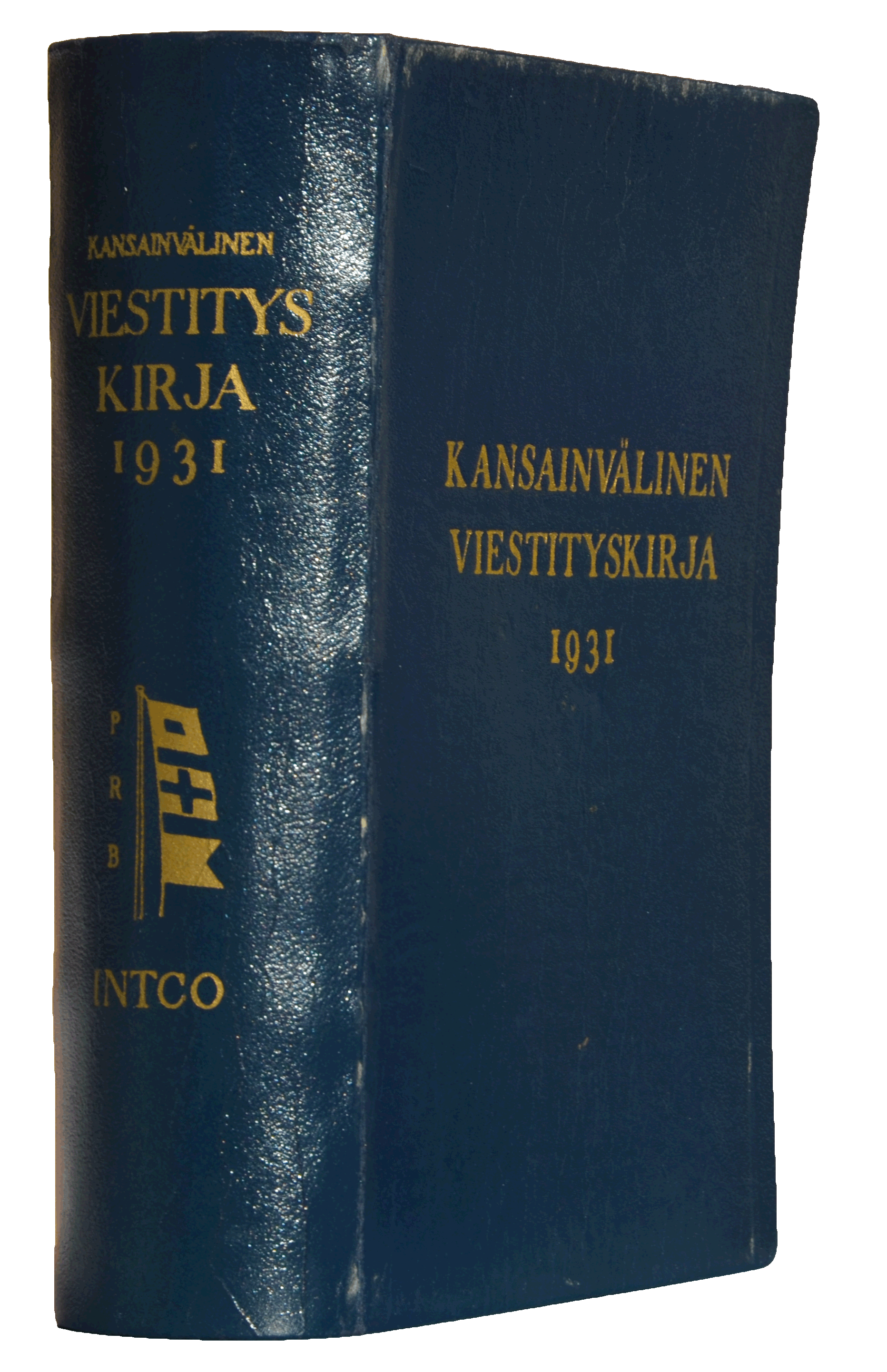 Toistaiseksi viimeinen suomenkielinen laitos kansainvälisestä viestikirjasta merenkulkulaitoksen ja merivoimien julkaisemana vuodelta 1949.